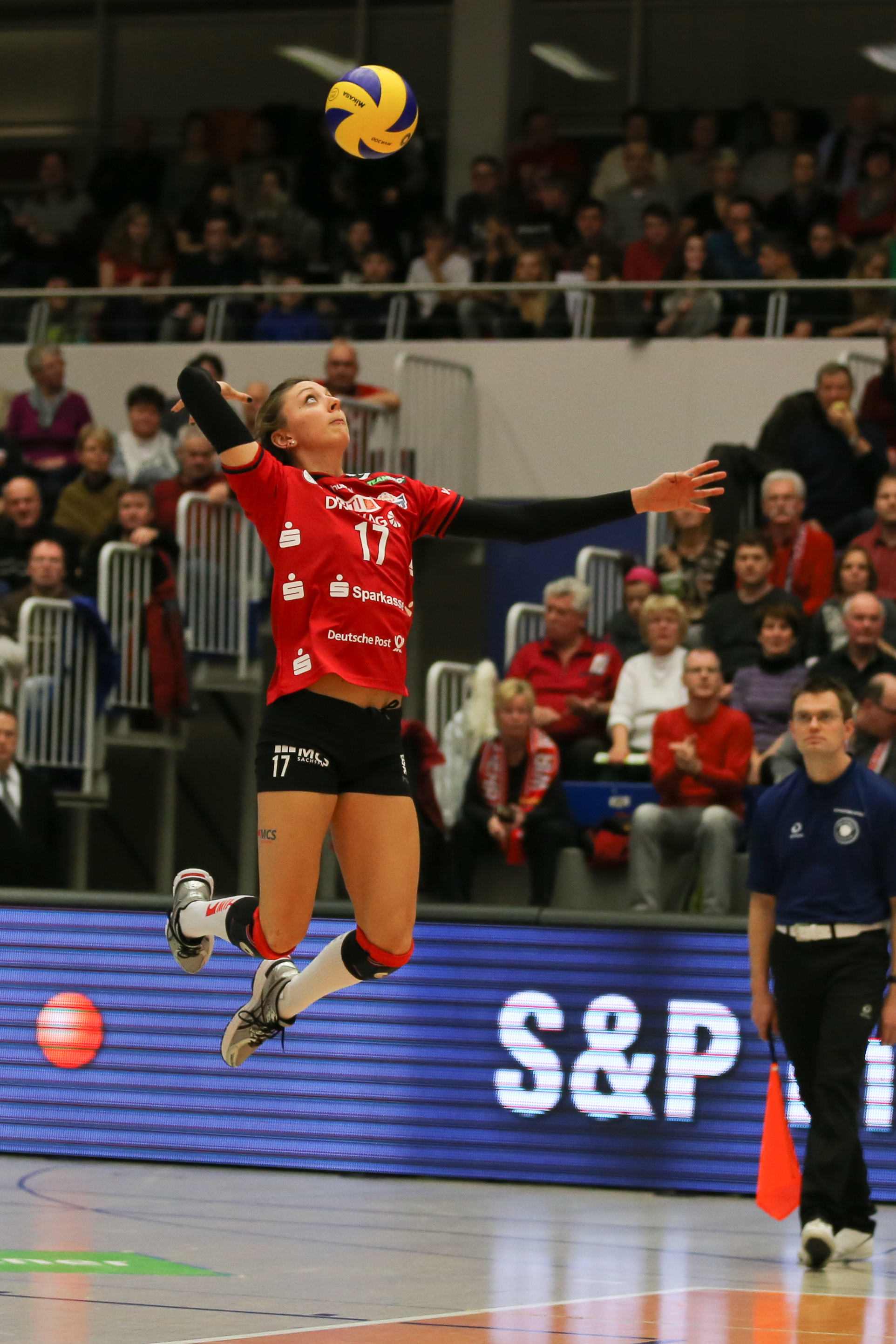 Volleyballspiel in der 1. Bundesliga des Dresdner SC gegen Aurubis Hamburg in der Margon Arena in Dresden.